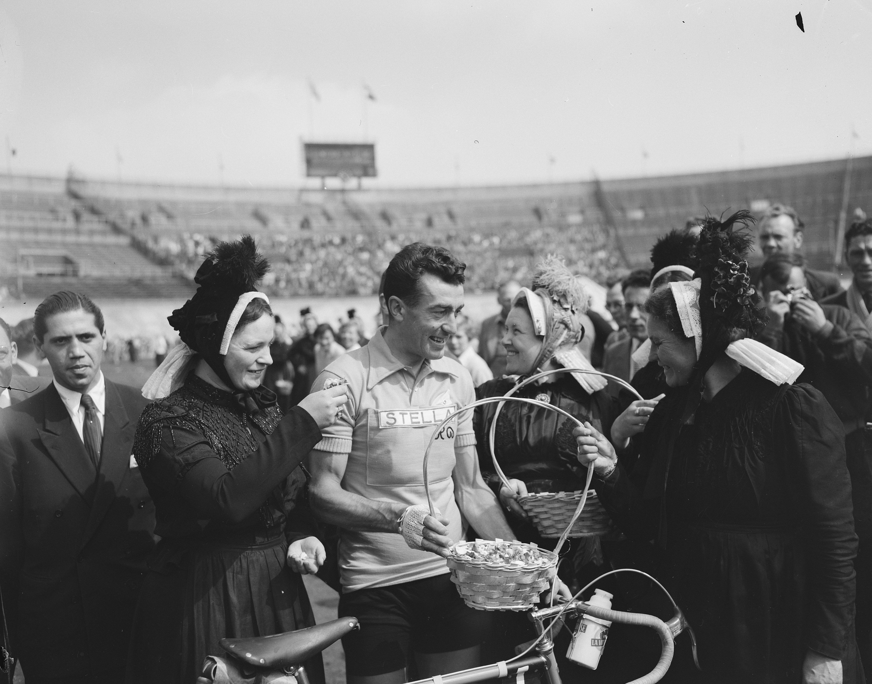 Tour de France , vertrek uit Amsterdam, Bobet krijgt mandje aangeboden [van vrouwen in klederdracht].